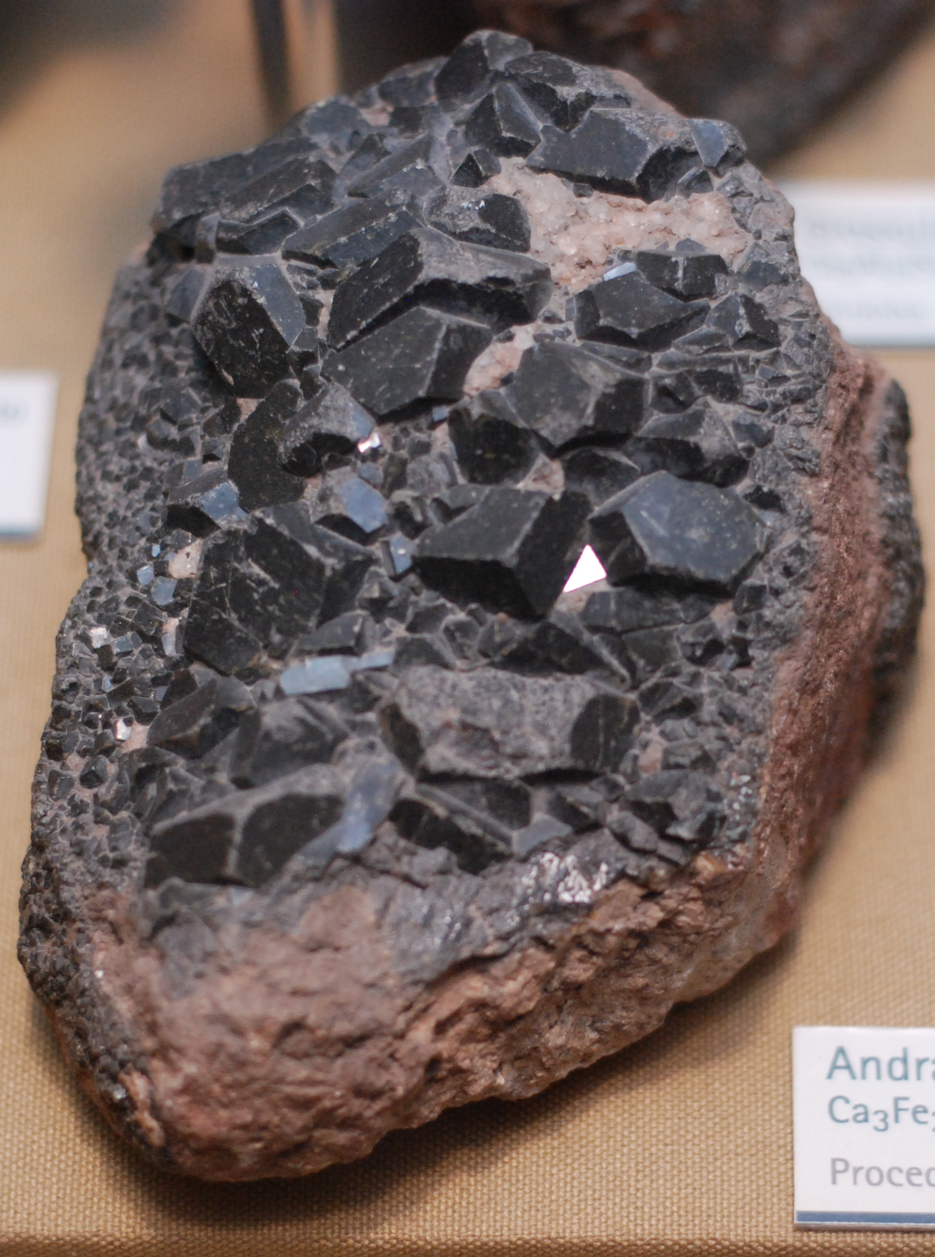 Andradita (granate) Ca3Fe3(Si3O12). Procedencia desconocida.